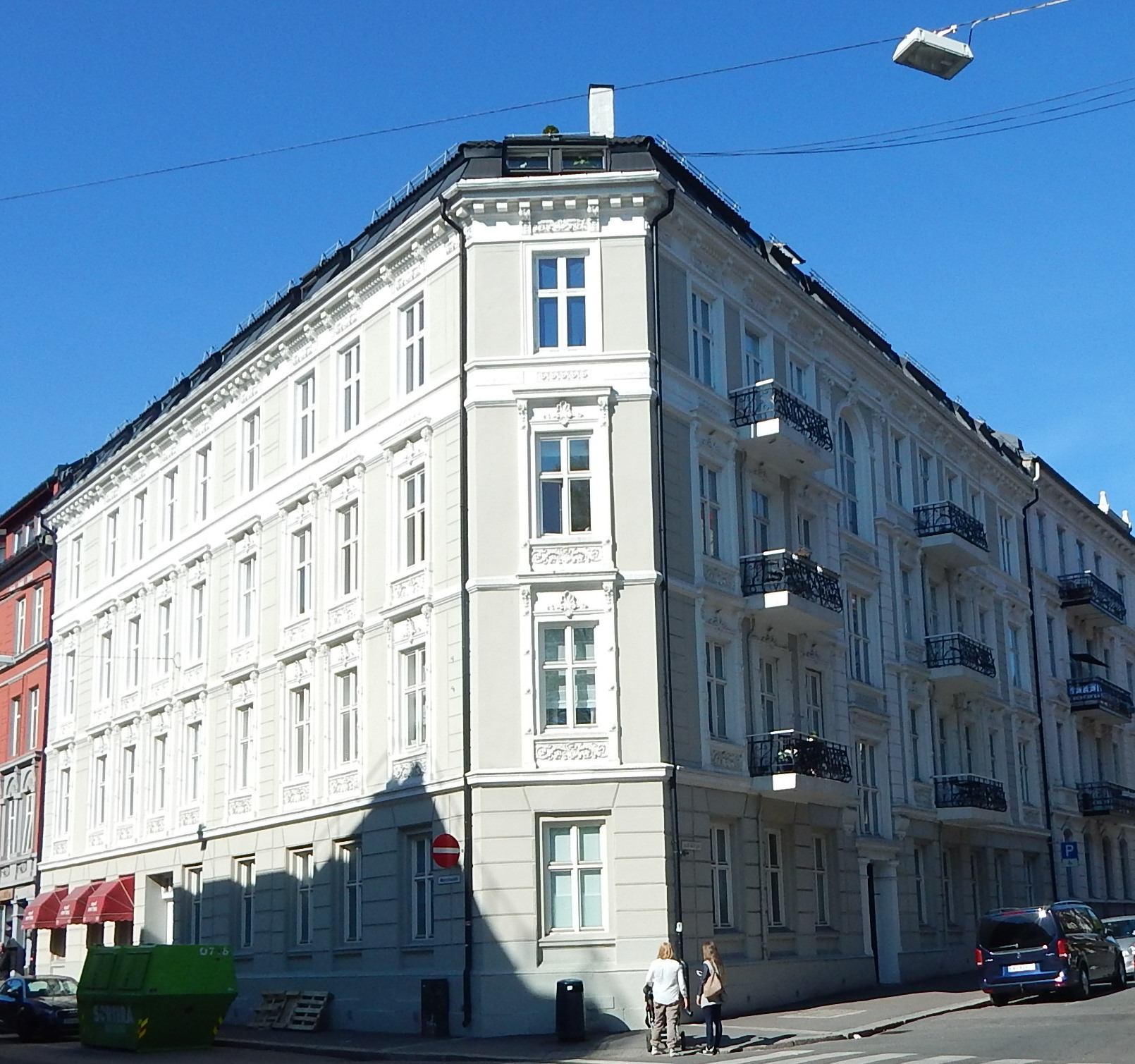 Majorstuveien 39 og Jacob Aalls gate 24. Arkitekt: Olaf Boye